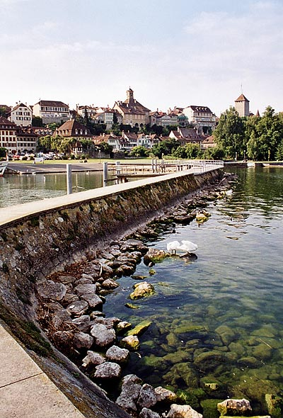 Murten: Blick vom Hafen zur Altstadt, die auf einer Anhöhe liegt